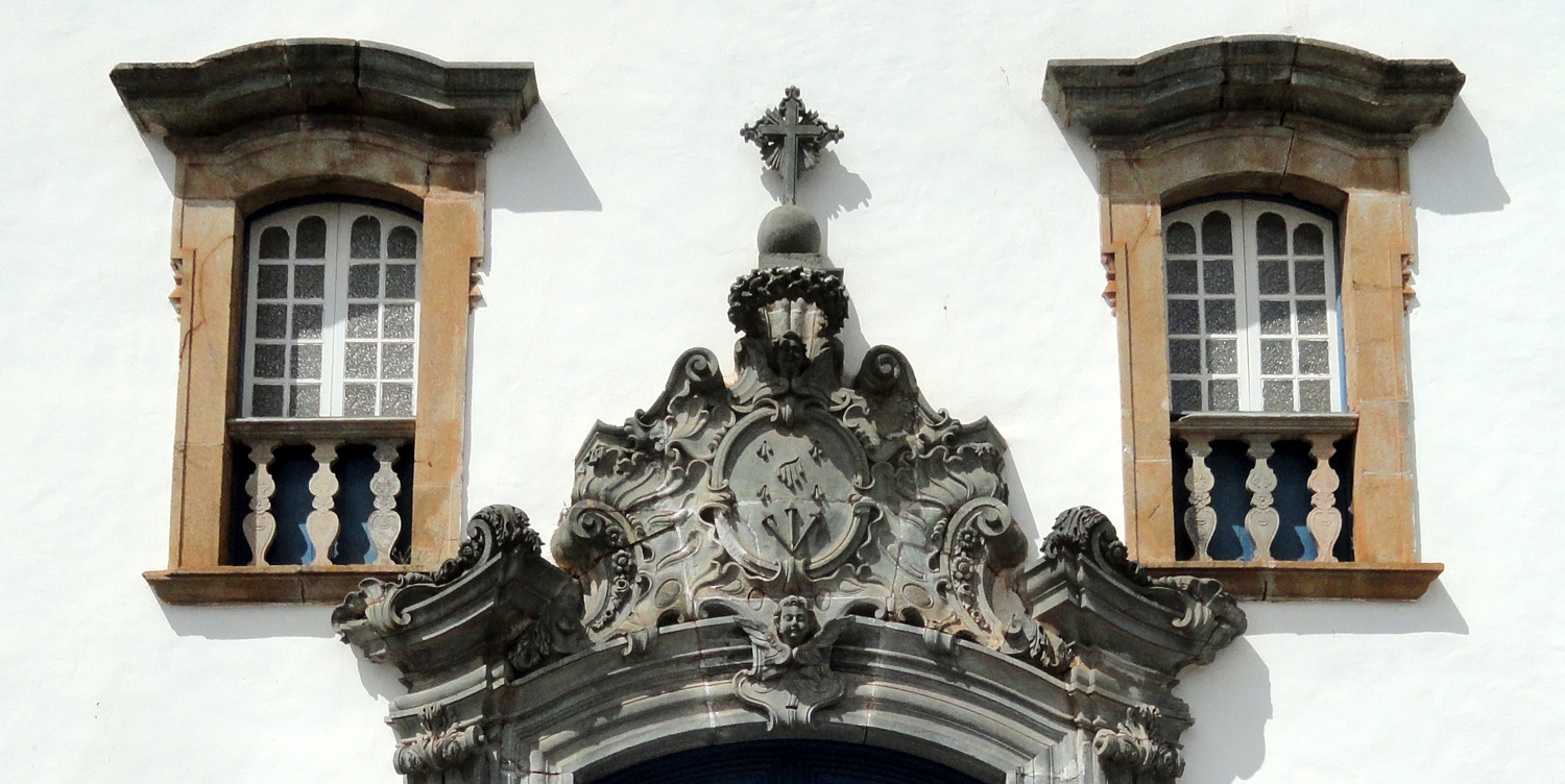 Santuário do Bom Jesus de Matosinhos, detalhe do frontispício da portada.